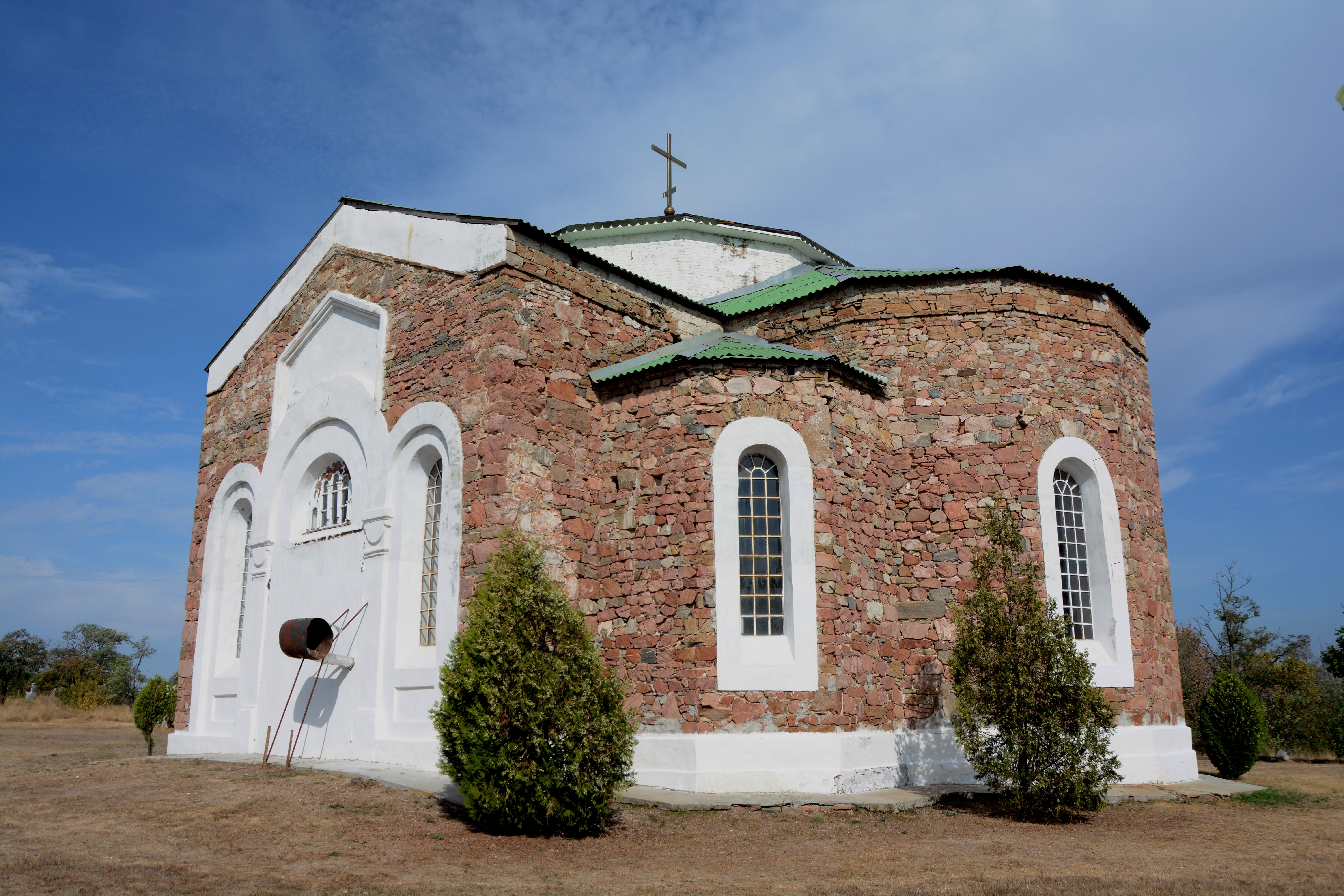 Церква, Берестове, околиця села